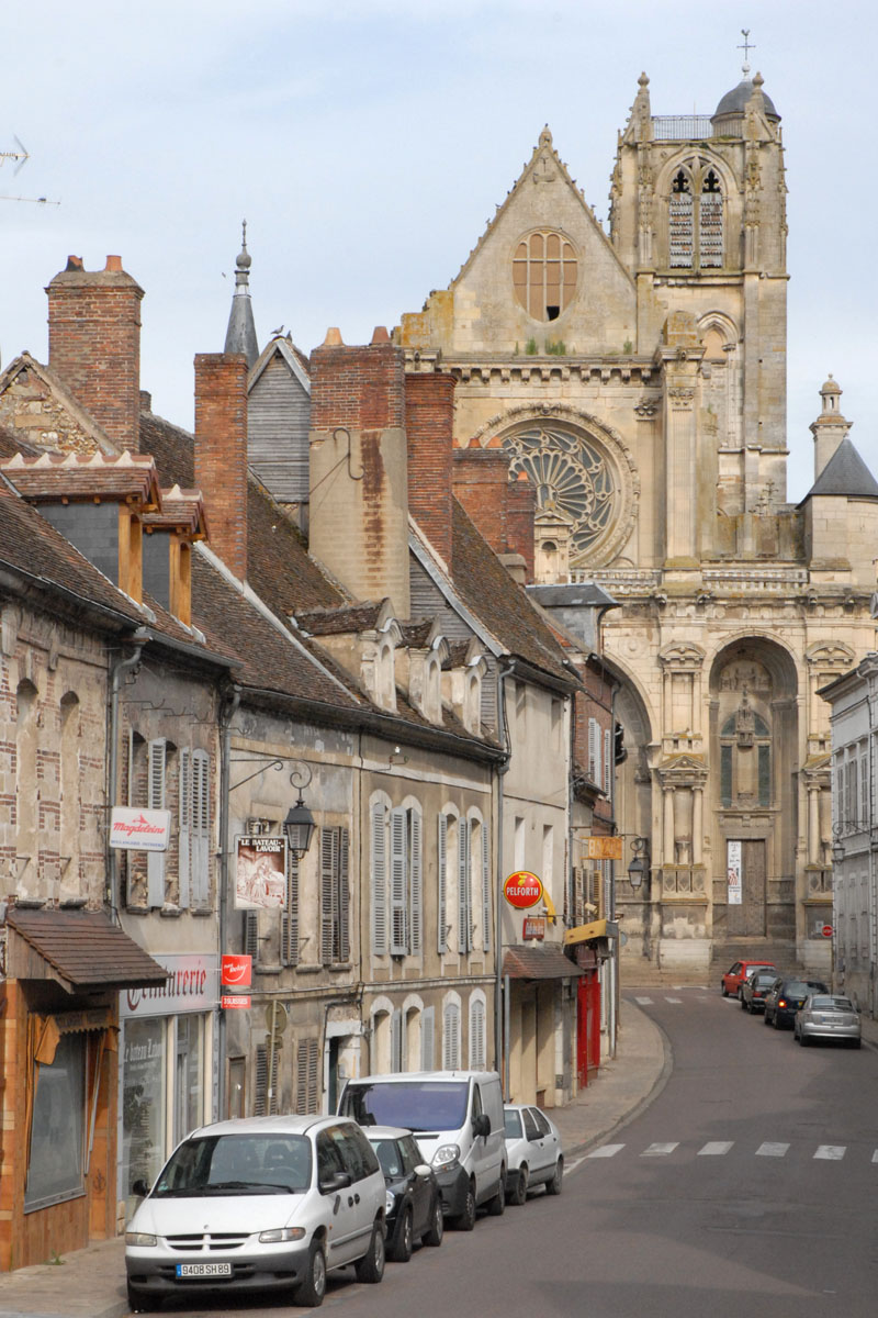 Villeneuve sur Yonne, jadis Villefranche le Roy, aux confins de l’Ile de France, de la Champagne et de la Bourgogne, possède un des plus belles églises de la région. Sa masse imposante domine la ville. Le visiteur y accède en franchissant l’Yonne par le vieux pont du Moyen Age, ou en pénétrant dans l’enceinte de la vieille ville par l’une de ses remarquables portes fortifiées du XIIIe siècle. L’église Notre-Dame de Villeneuve-sur-Yonne prend place parmi les œuvres d’art d’une époque où l’élan de la foi construit les grandes cathédrales. Le XIIe siècle voit naître Vézelay (1096-1132), Saint-Denys (1137-1189). Le XIIIe siècle voit s’édifier Soissons, Bourges et Chartres (1164-1260). La première pierre de l'église Notre-Dame aurait été bénie en 1163 par le pape Alexandre III, alors exilé par l’empereur Frédéric Barberousse et réfugié en France auprès du Roi Louis VII. Philippe Auguste continue l’édifice qui ne sera achevé (façade et deux dernières travées) qu’à la fin du XVIe siècle. Dès 1849, l’église Notre-Dame est classée parmi les monuments historiques. La façade est l’œuvre de l’architecte Jean Chéreau qui édifia Saint-Jean de Joigny.Y sont gravées les dates de 1547 et de 1612.